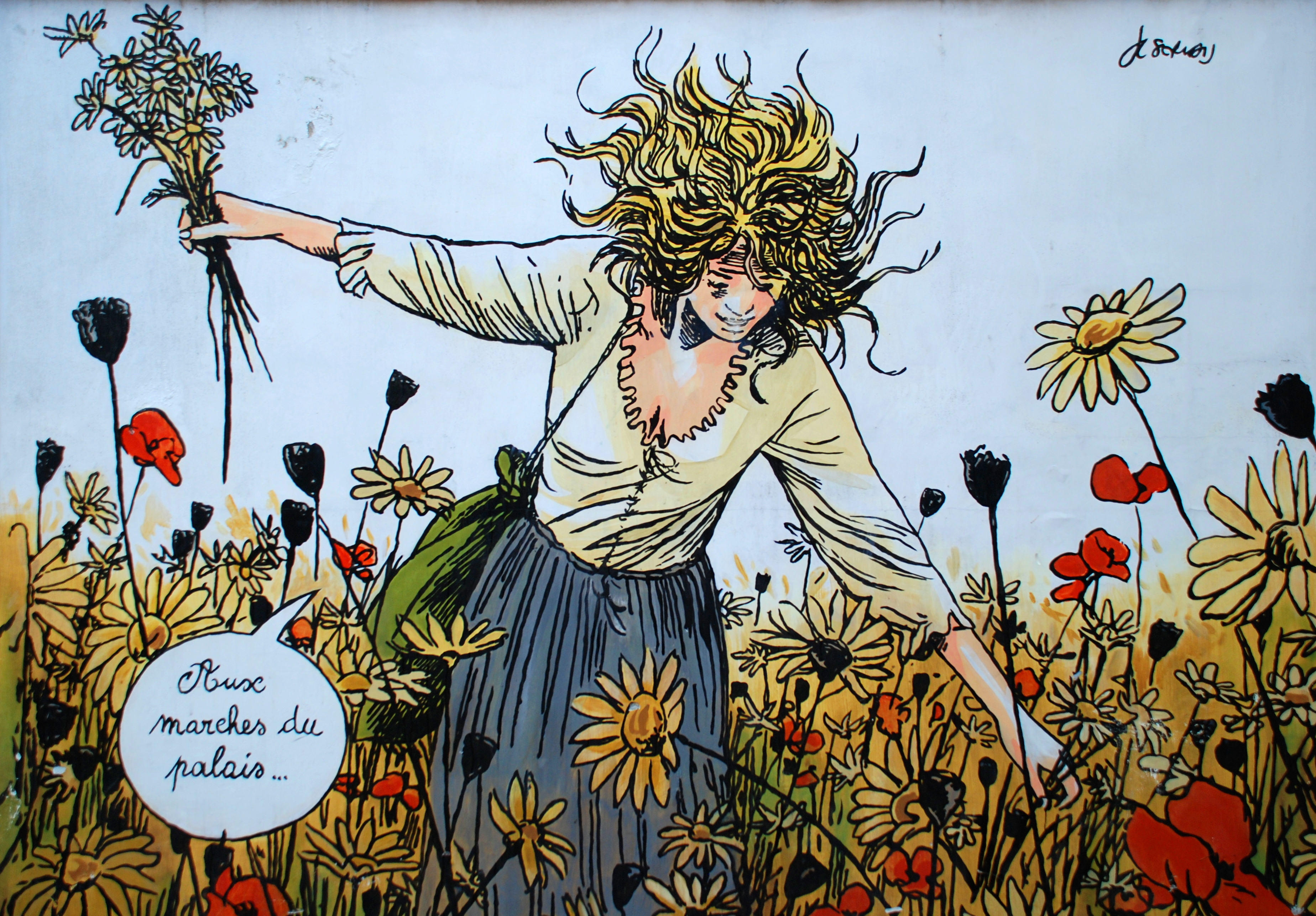 Belgique - Louvain-la-Neuve - ruelle Saint-Éloi - Fresque Tendre Violette, de Jean-Claude Servais (FOP in Belgium since 2016)